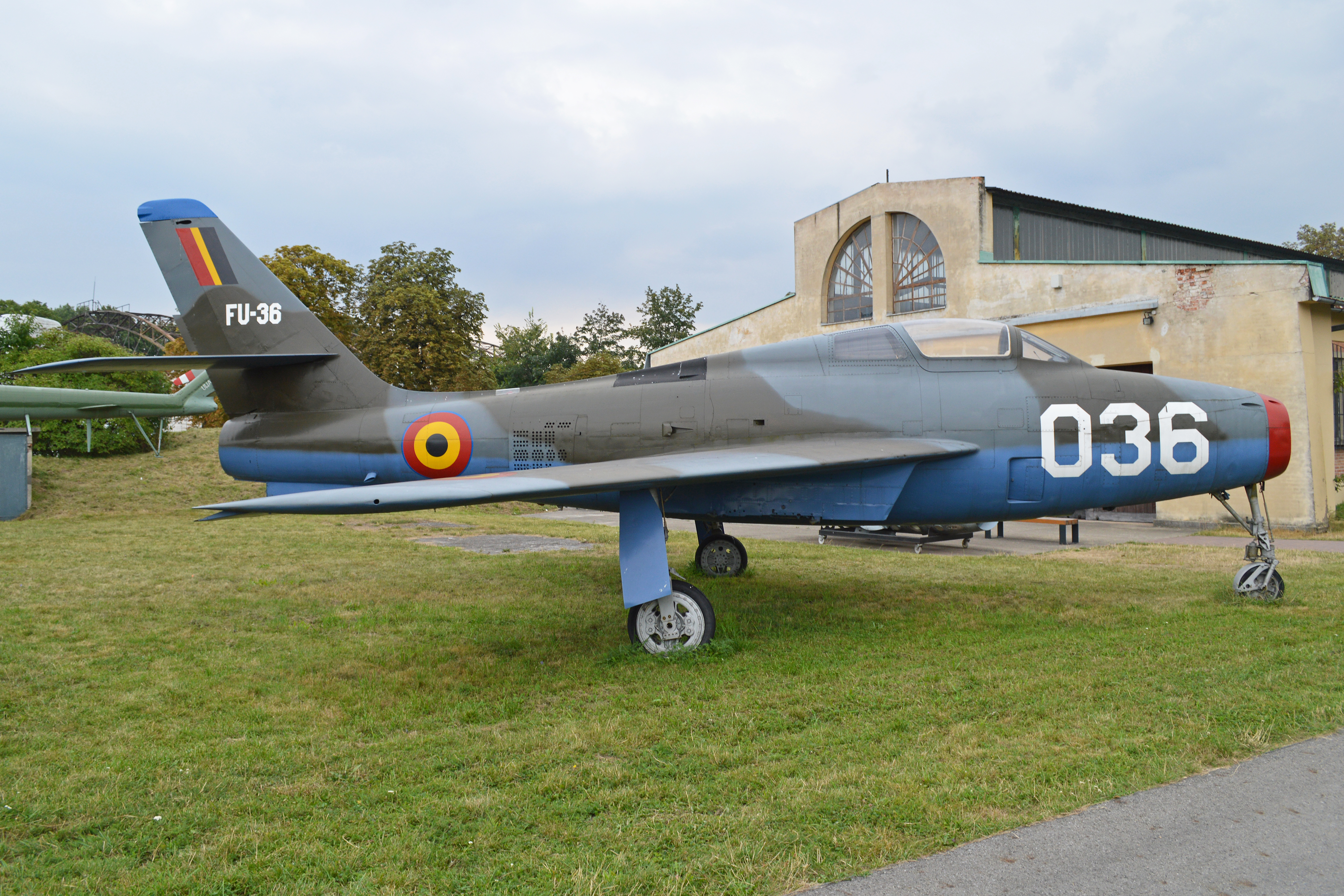 Allocated US Military serial ‘52-7157’. On outside display at the Muzeum Lotnictwa Polskiego. Krakow, Poland. 23-8-2013